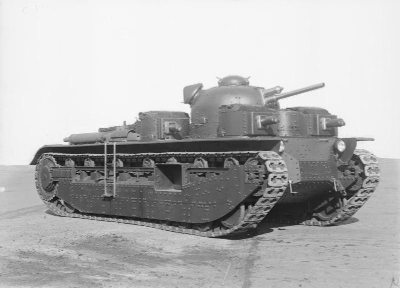 Vickers Independent Heavy Tank (A1E1).